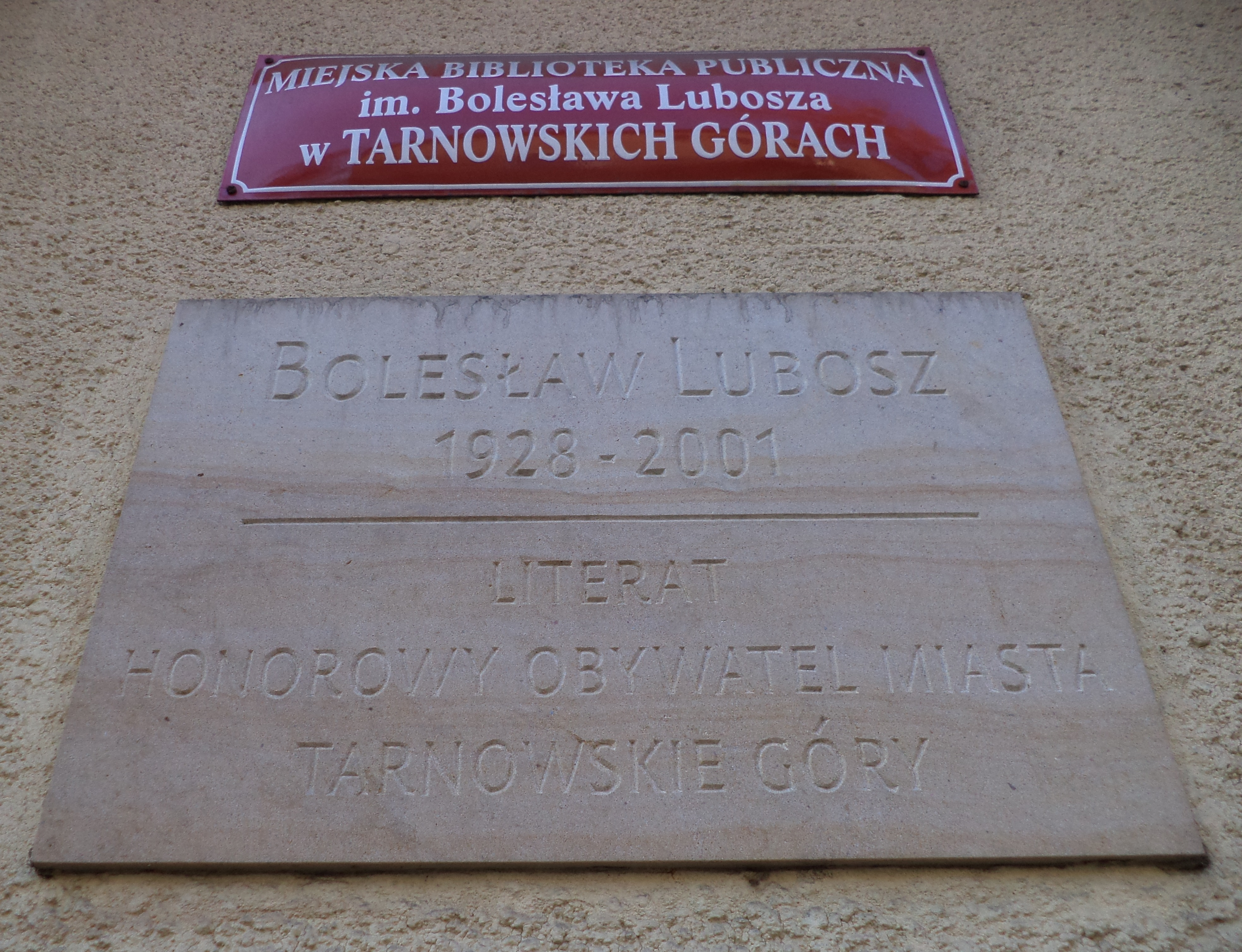 Tablica upamiętniająca literata Bolesława Lubosz - patrona Miejskiej Biblioteki Publicznej w Tarnowskich Górach